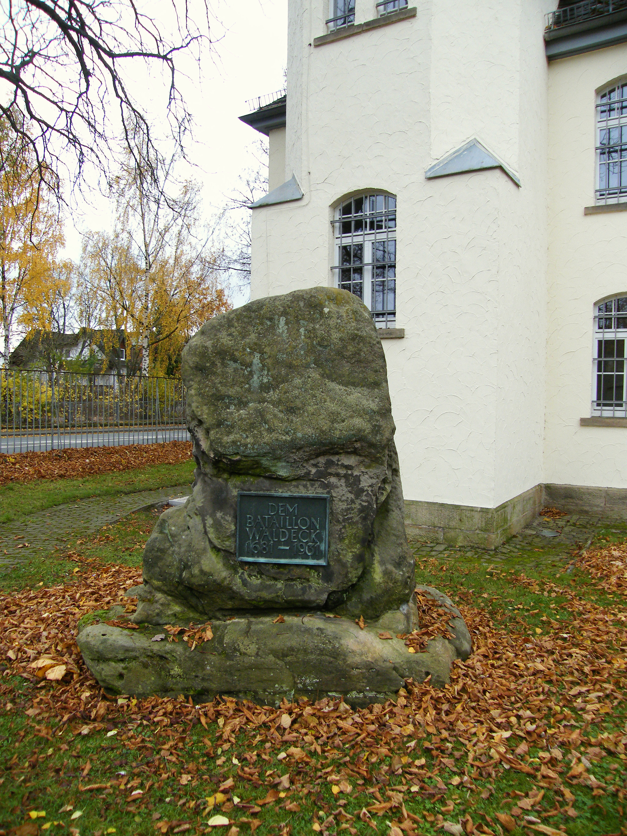 Gedenkstein zur Erinnerung an das Bataillon Waldeck (1681-1931) Standort ehem. belgischen Kaserne in Bad Arolsen. Das selbstständigen Bataillons Waldeck ging 1867 in das preußische Infanterieregiment Nr. 83 als Füsilierbataillon (III. Btl) ein. Die Residenzstadt Arolsen wurde damit preußische Garnisonsstadt. Am Alleefeld entstand eine Kaserne nebst Offizierskasino und Stabsgebäude.